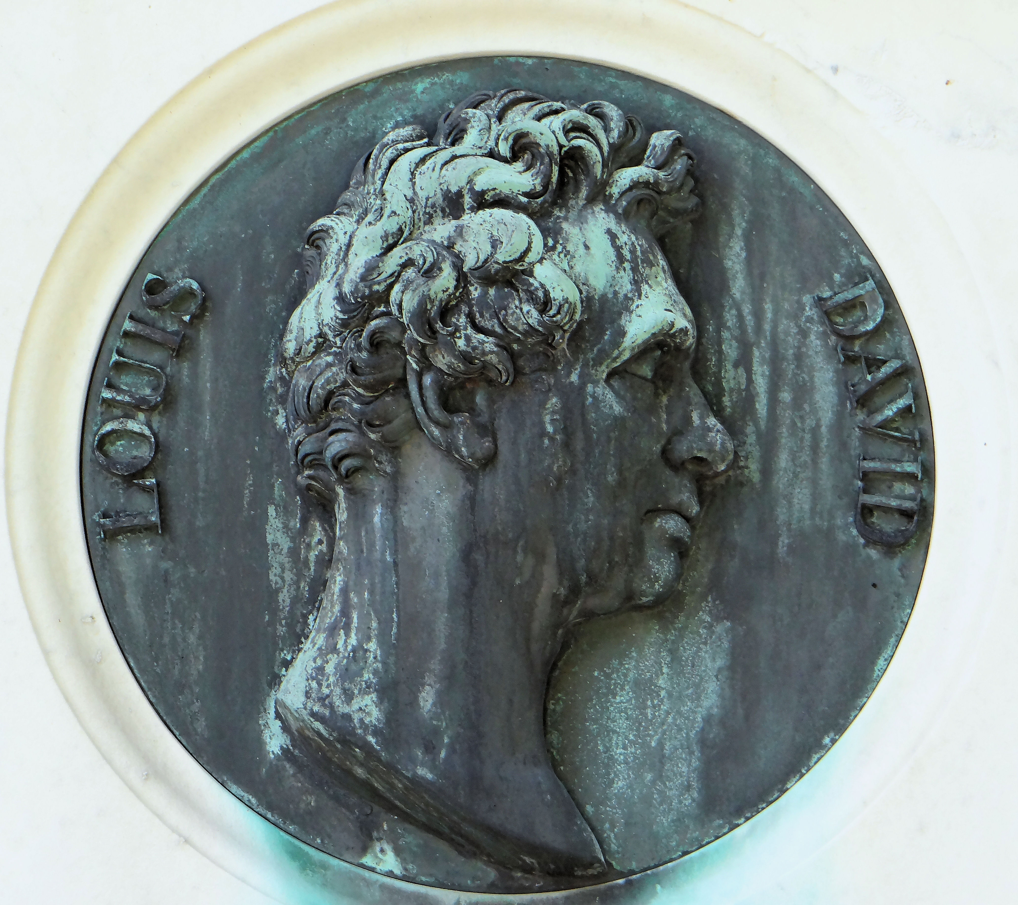 Cimetière du Père-Lachaise - Médaille de Jacques-Louis David sur la tombe de son épouse